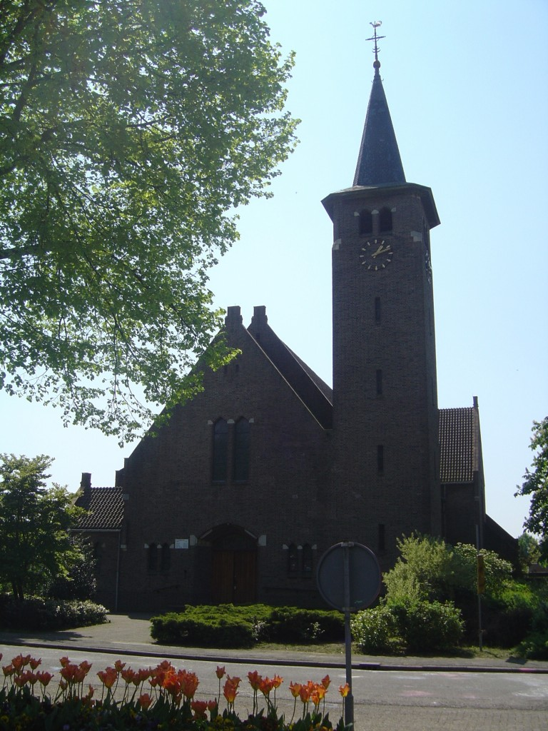 De Lommse kerk, gebouwd in 1936, geldt als een van de markante gebouwen in het dorp.